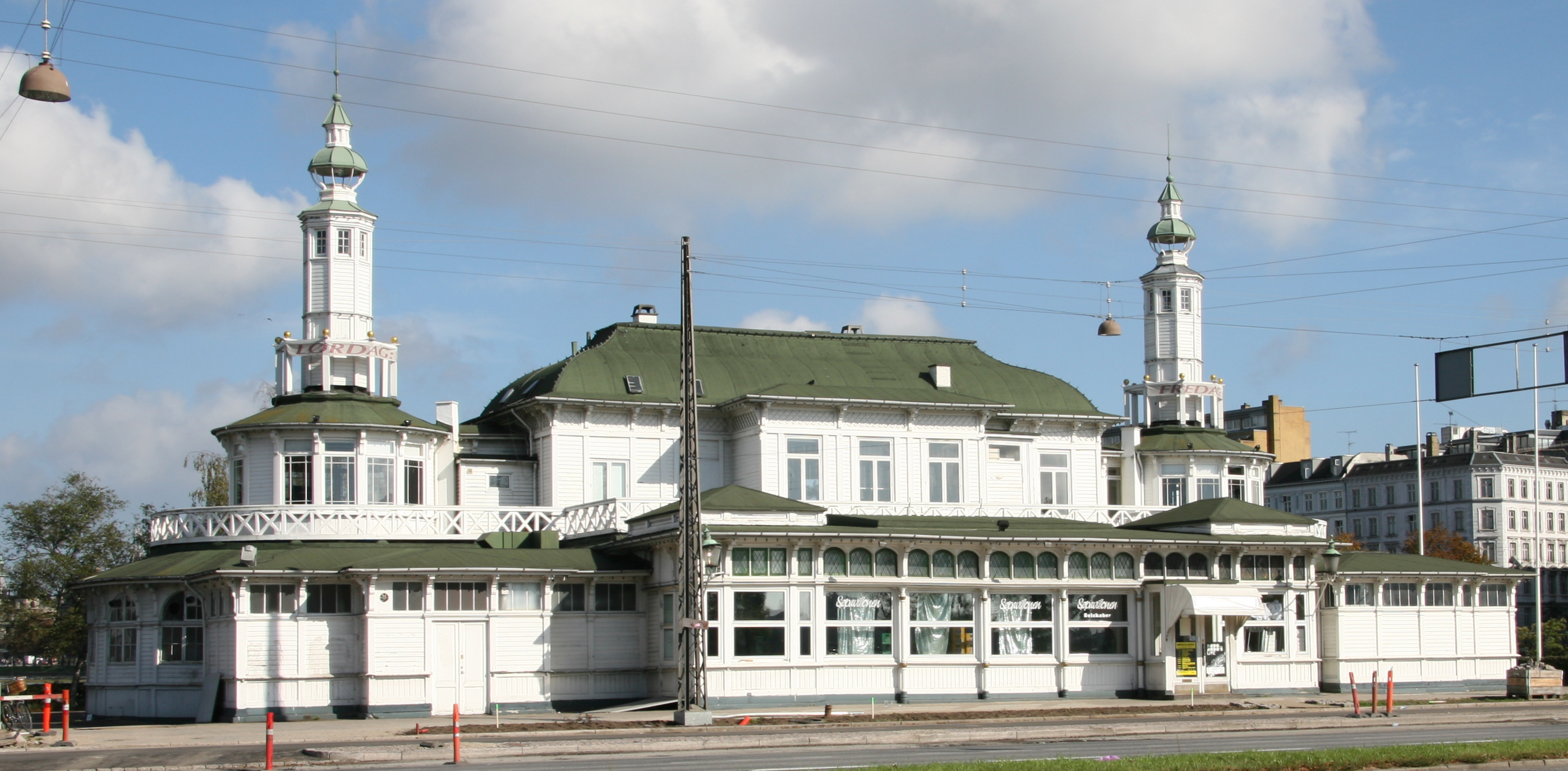 Søpavillonen, Copenhagen, Denmark.